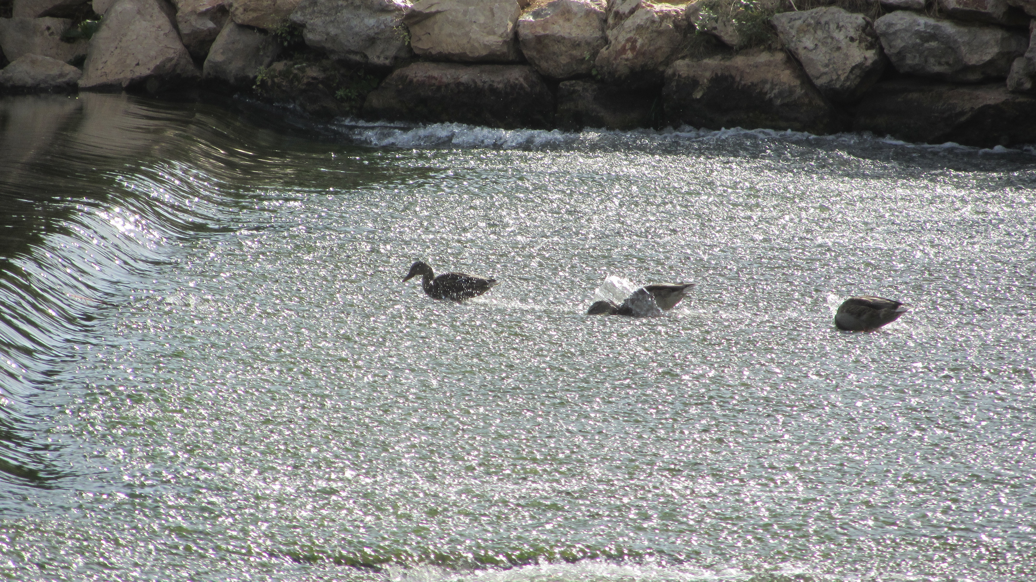 Presa de Cayo en el río Henares con ánades alimentándose, a su paso por Alcalá de Henares (Comunidad de Madrid - España). This is a photography of a Special Area of Conservation in Spain with the ID: ES3110001. Natura2000 entry, EEA entry